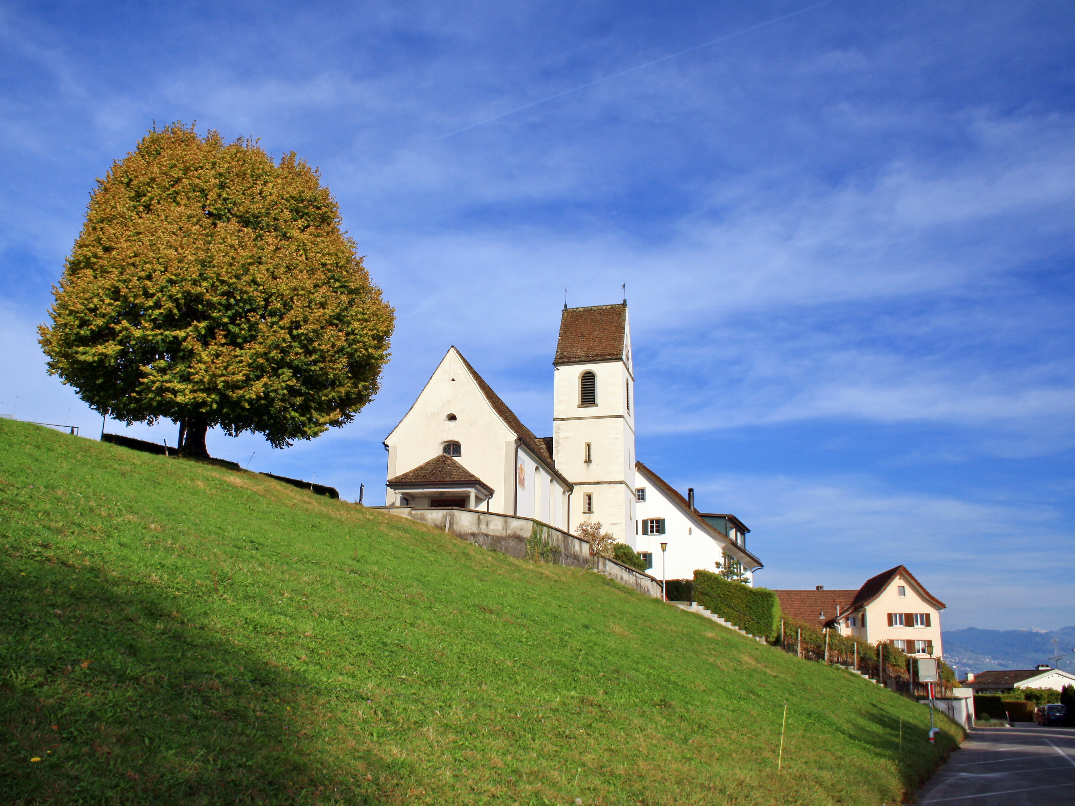 Bollingen on Obersee (upper Lake Zürich) shore